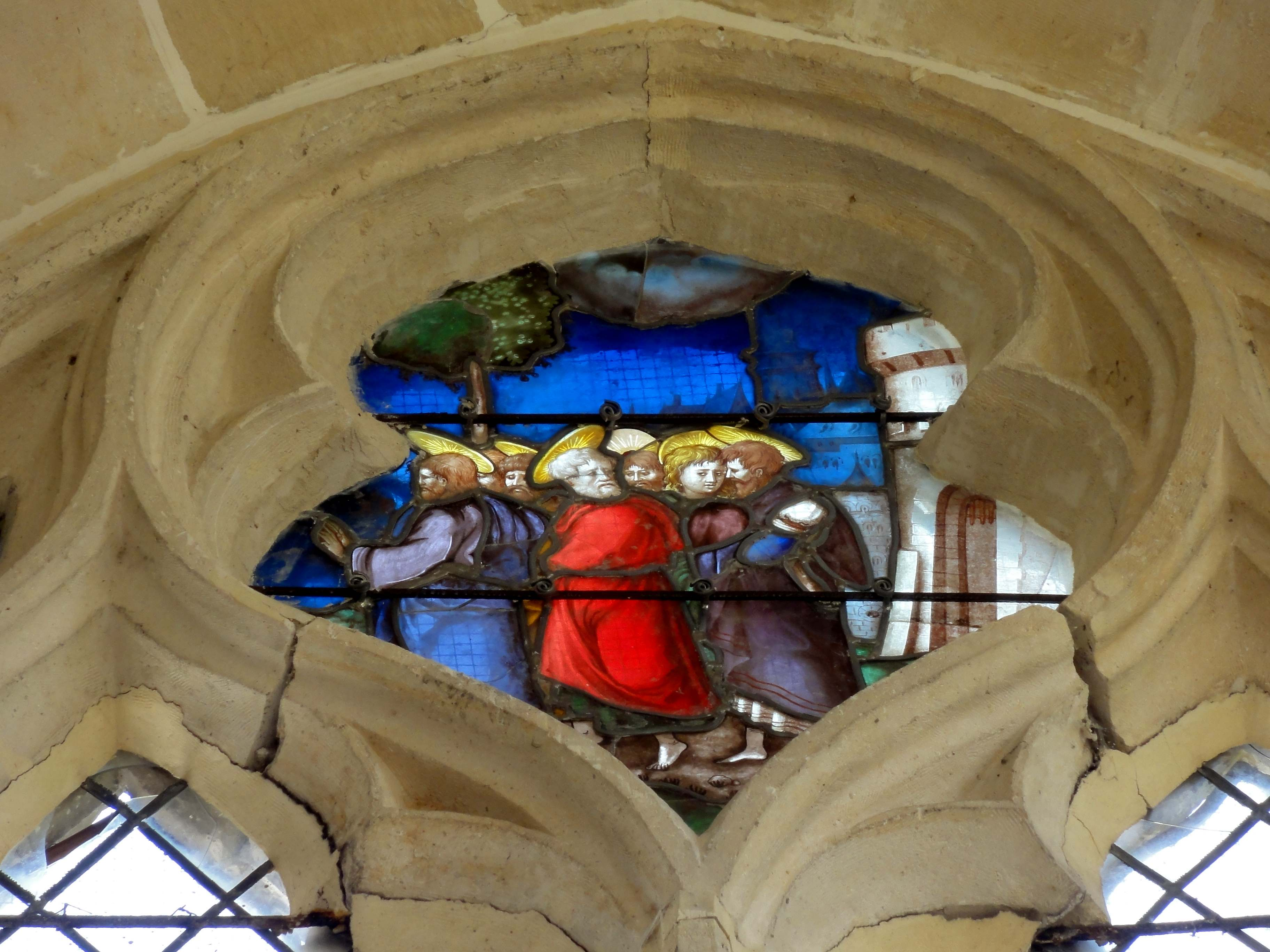 Verrière n° 4 (croisillon sud) : Baiser de Judas.